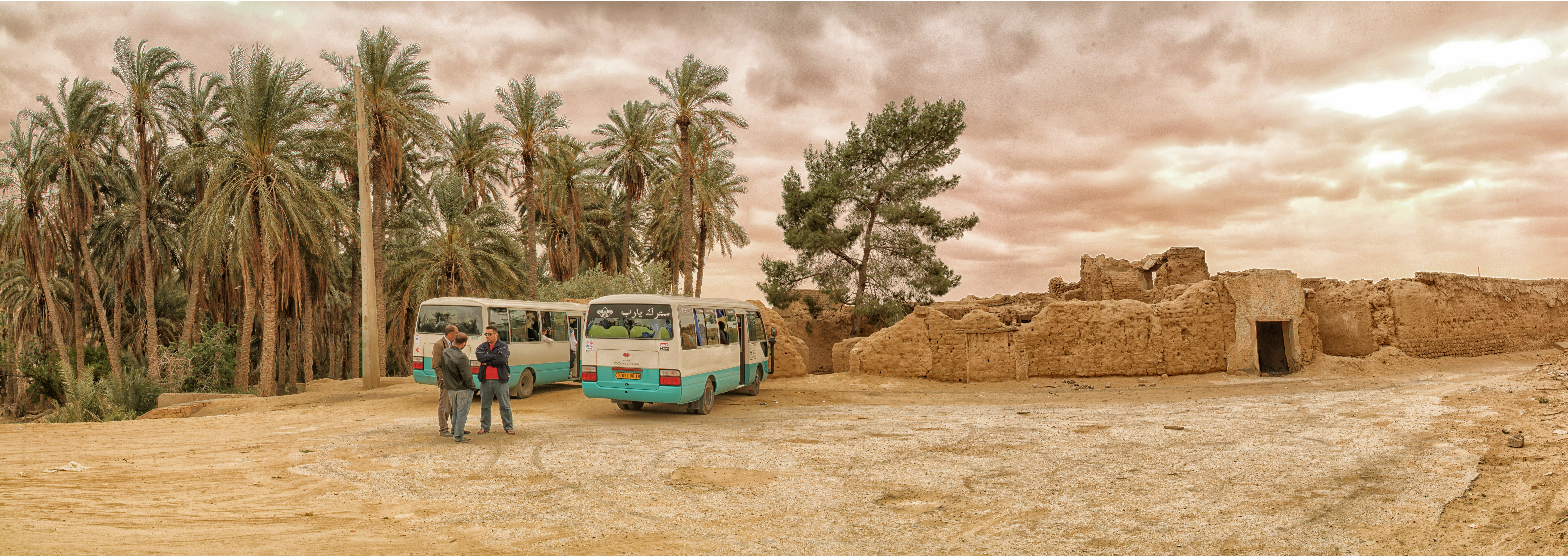 مدينة نقرين القديمة الواقعة في دائرة بئر عاتر ولاية تبسة التي تعود إلى الحقبة الرومانية